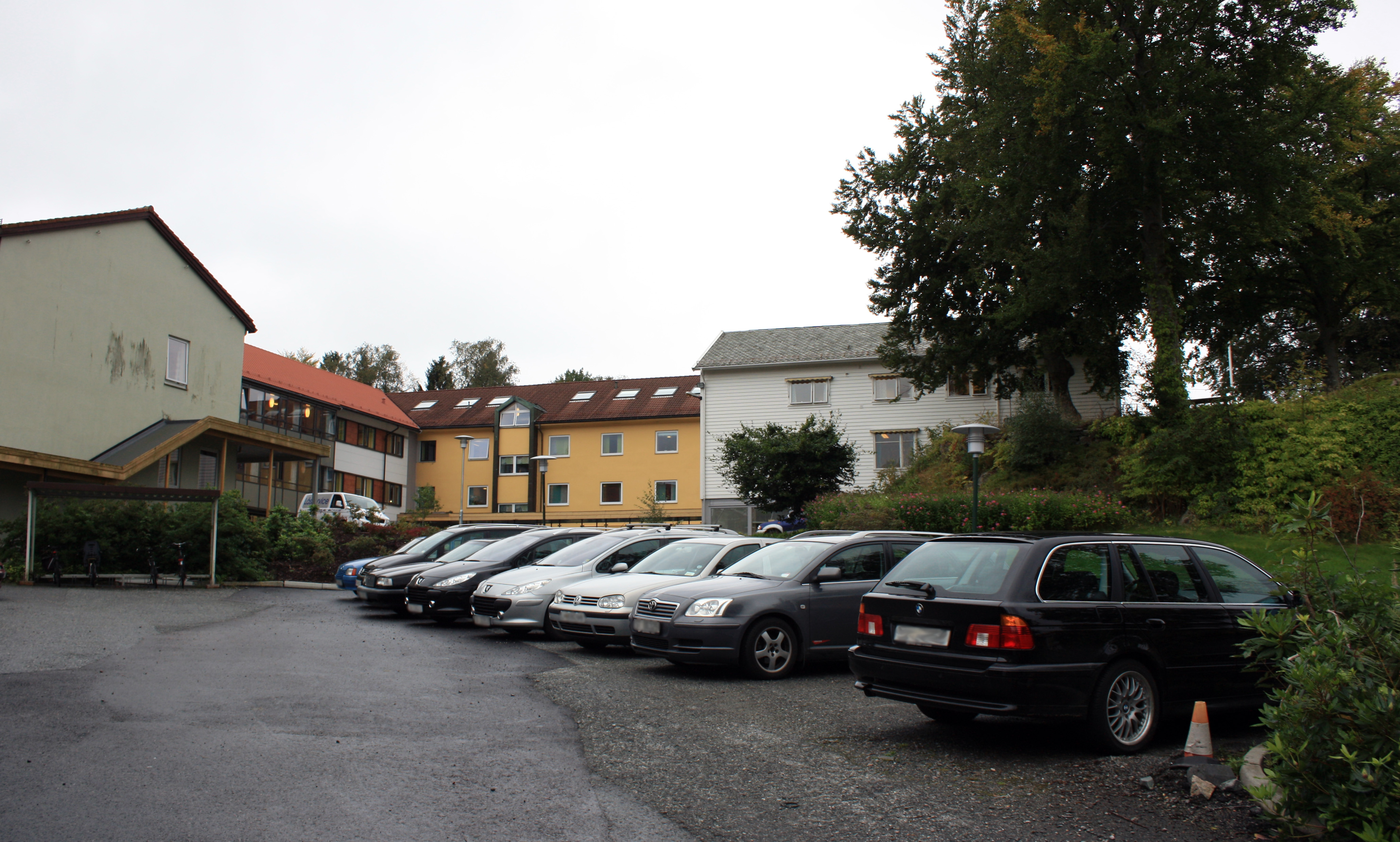 Solli DPS, Fana, Bergen. Solli disitiktpsykiatriske senter.